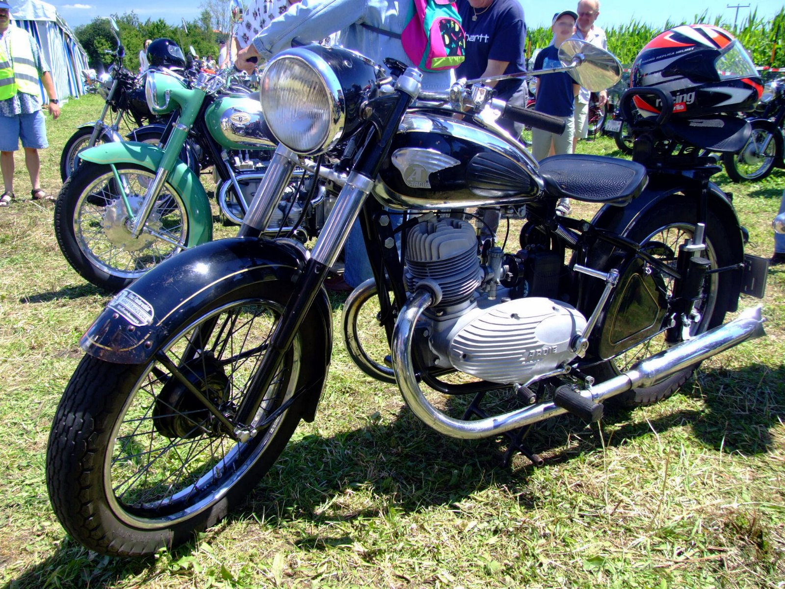 Ardie 10PS 1952